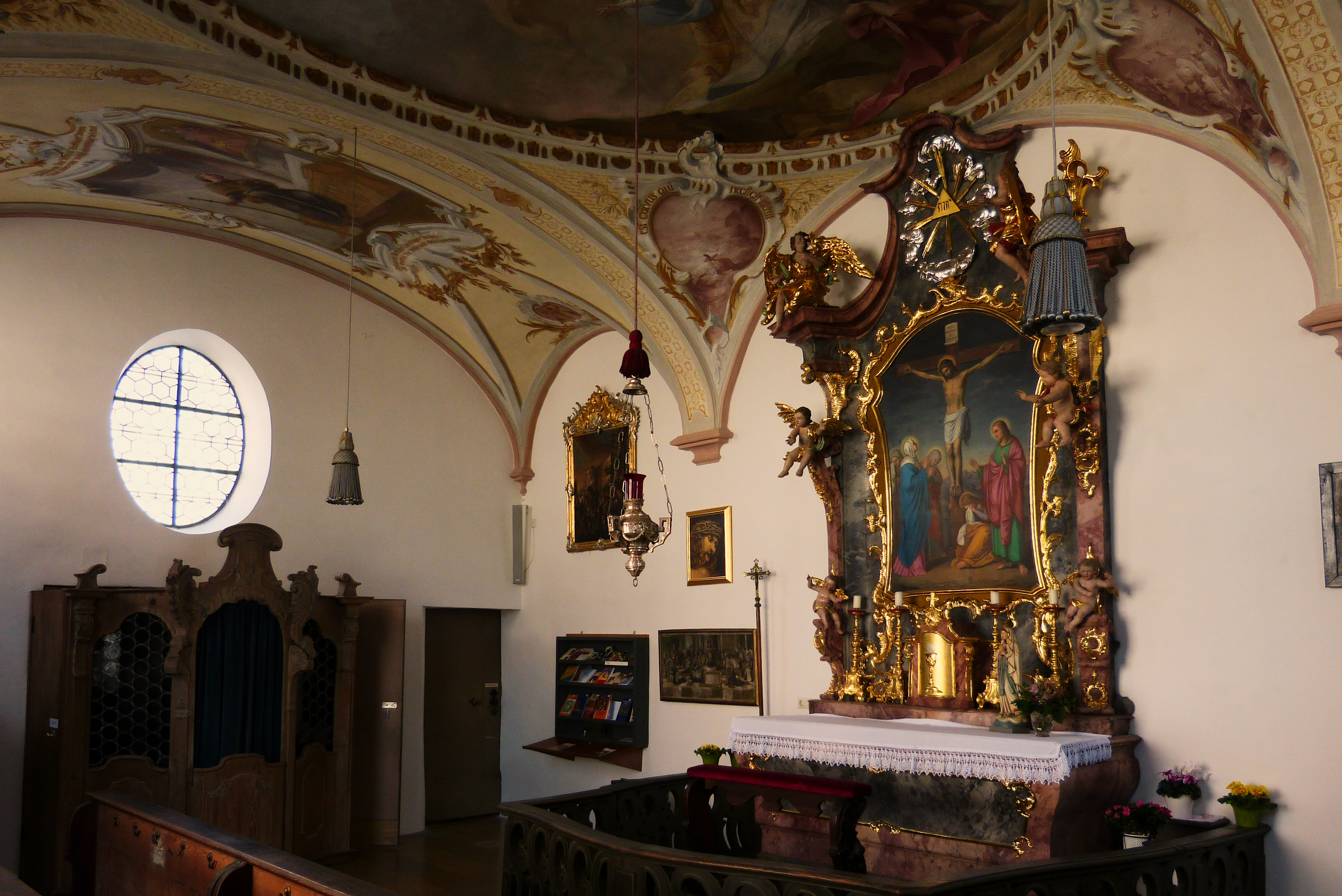 Beichtkapelle der Wallfahrtskirche St. Maria von Loreto auf dem Kobel in Westheim (Neusäß)